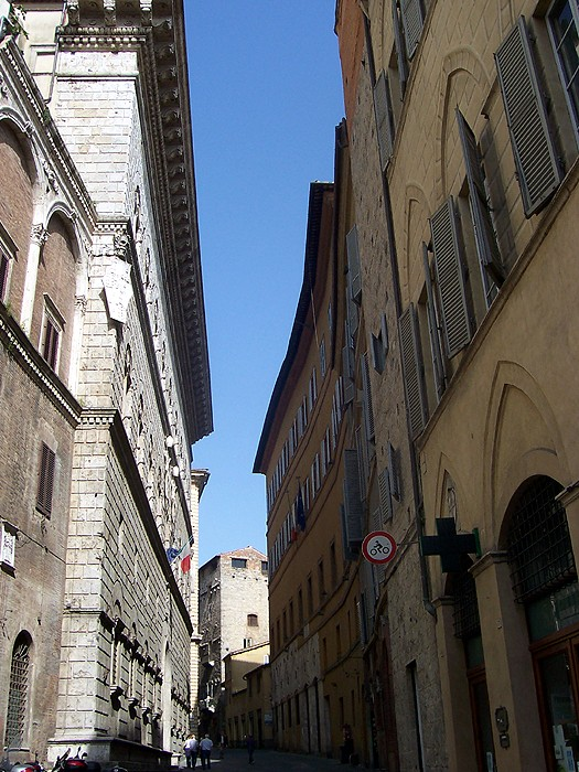 Siena - Via Banchi di Sotto